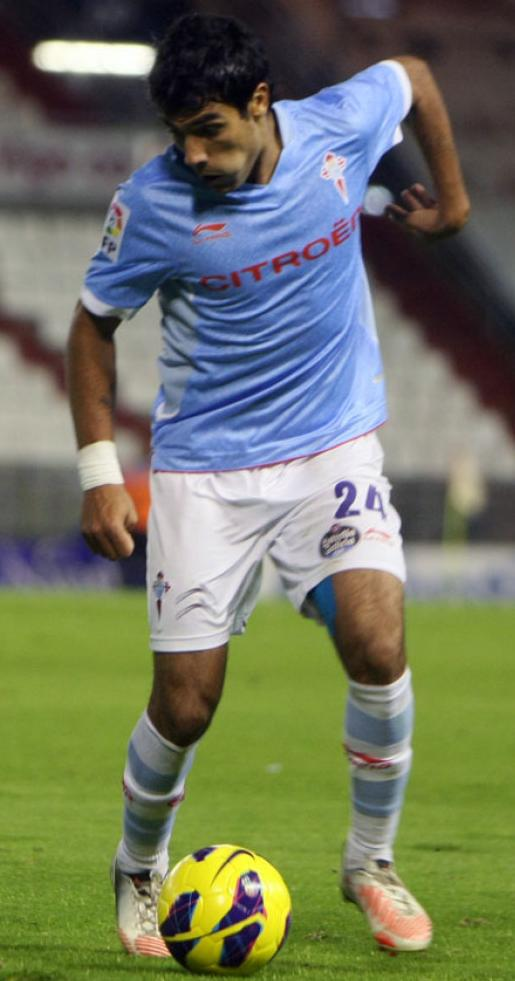 Augusto Fernández xogador do Celta, nunha xogada do partido do Celta-Deportivo no 2012.